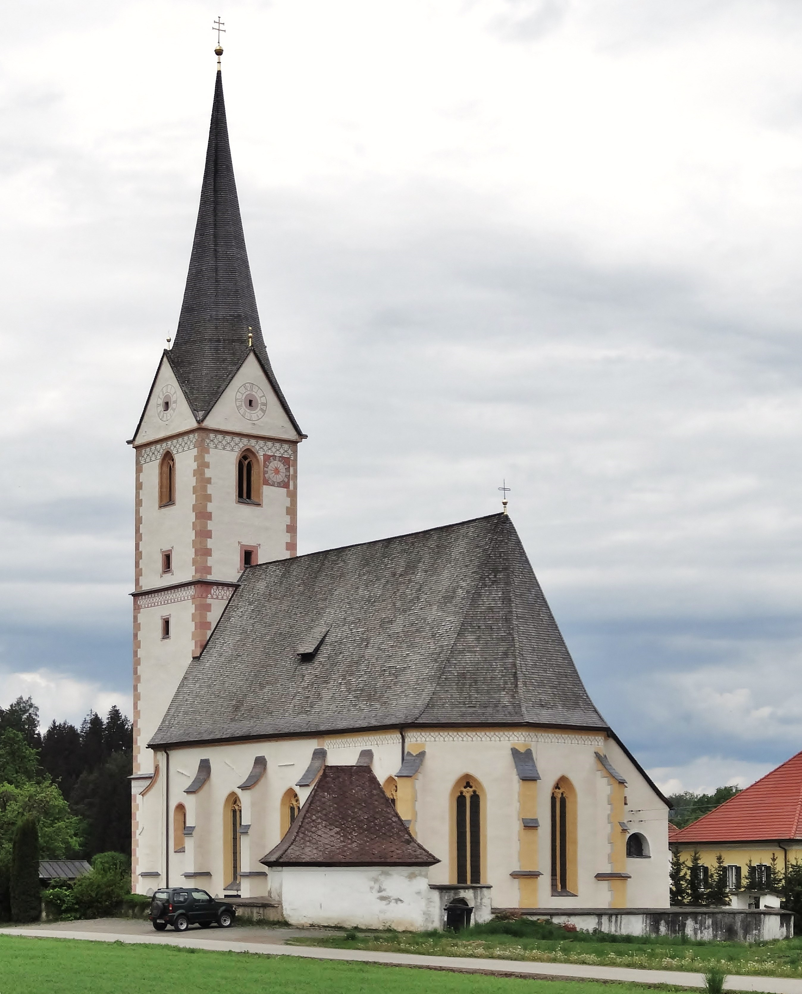 Kath. Filialkirche St. Sebastian und Friedhof, Launsdorf, Ansicht von Südosten